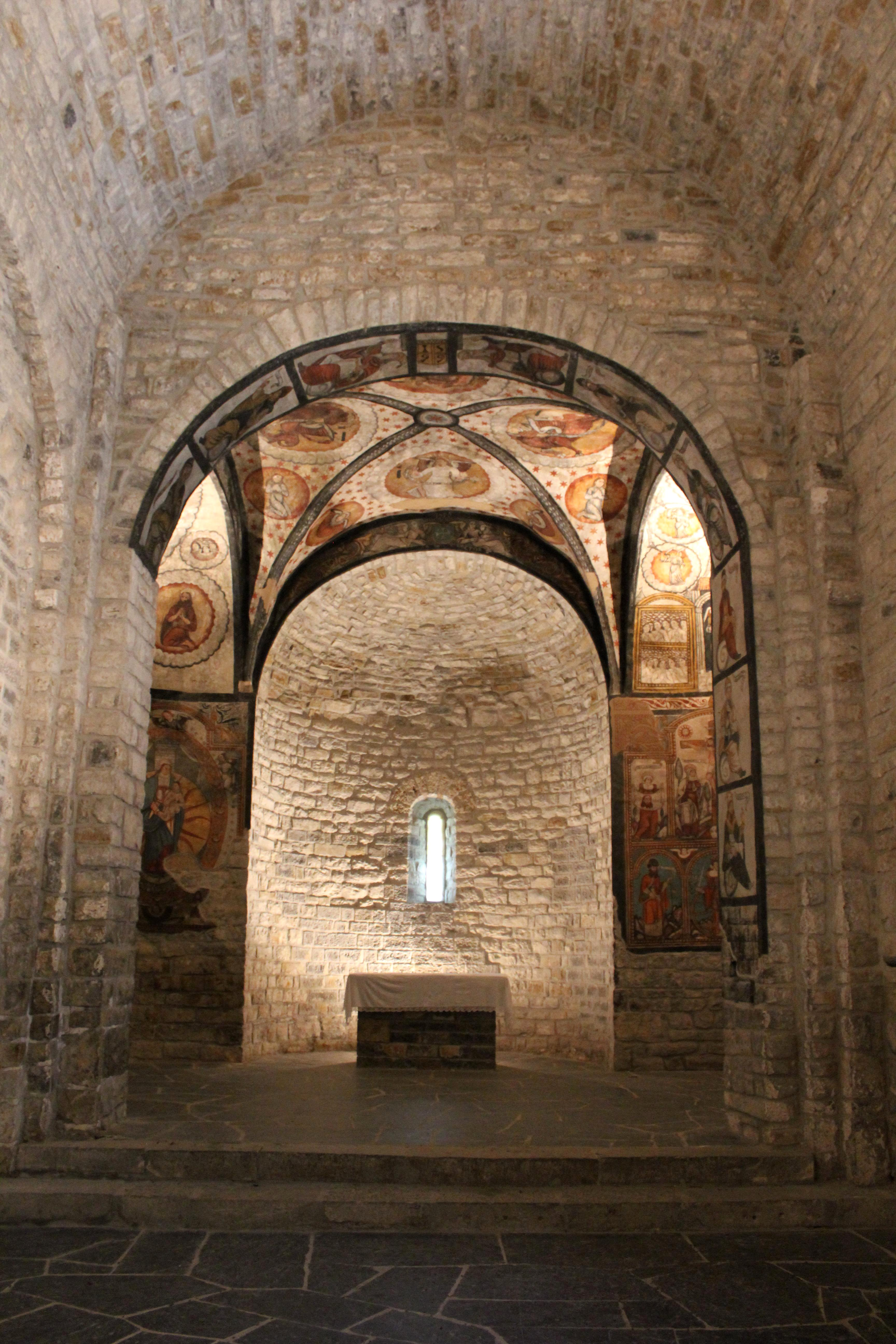 Aragonés: Altar en a ilesia de Sant Chuan d'o Toledo (A Fueva).